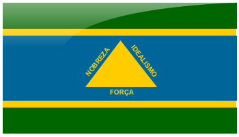 Bandeira do município de Posse, Goiás, Brasil.